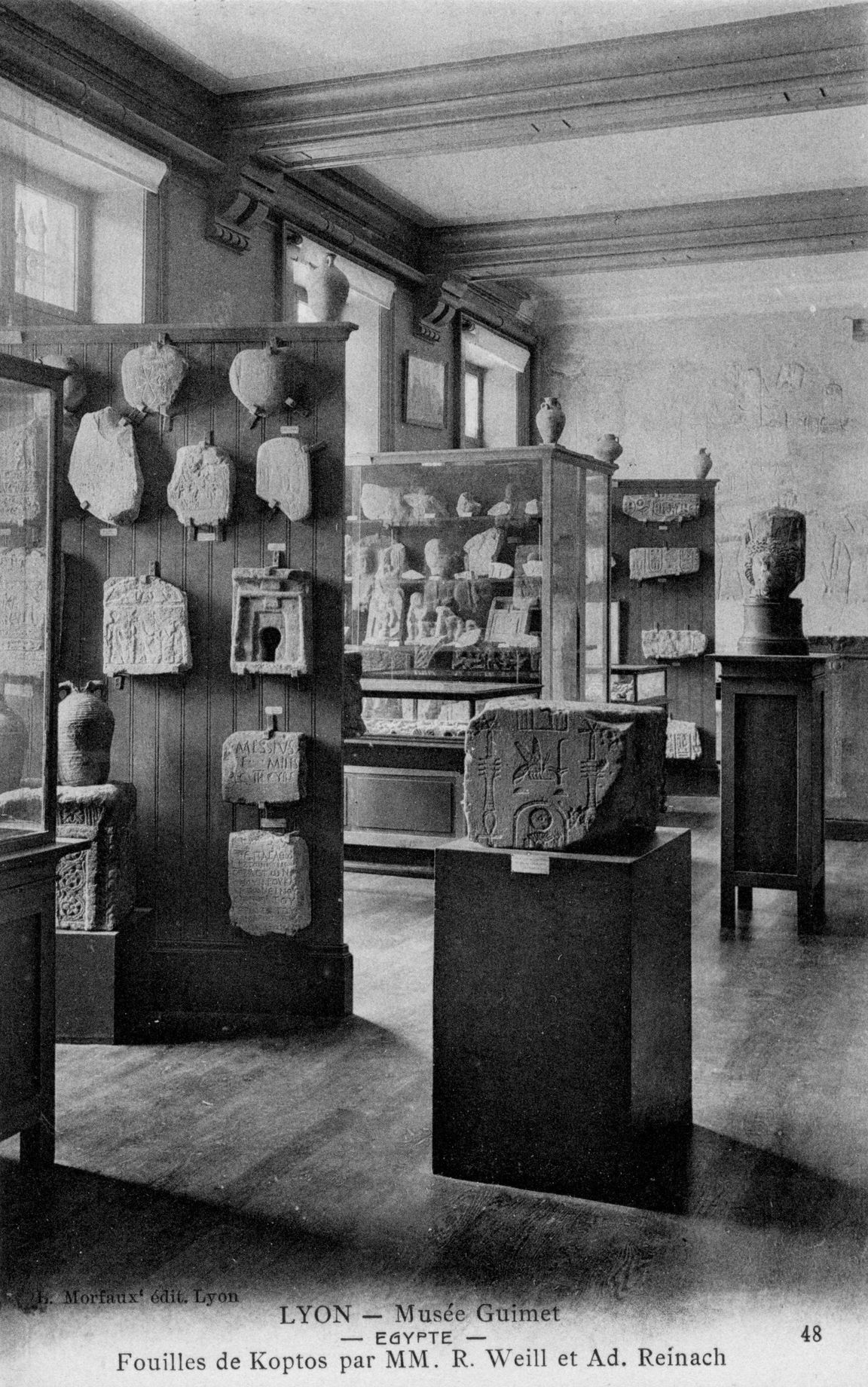 Photographie du premier musée Guimet de Lyon